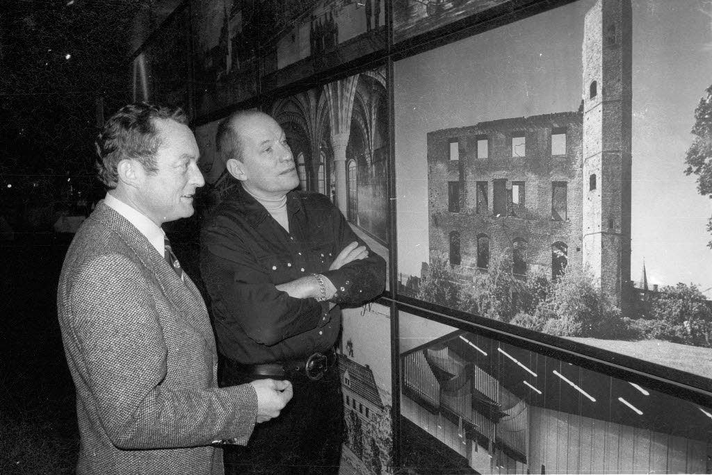 Jürgen Roland (rechts) vor Fotos des im Zweiten Weltkrieg zerstörten Schlosses.